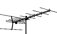 Schets Yagi antenne